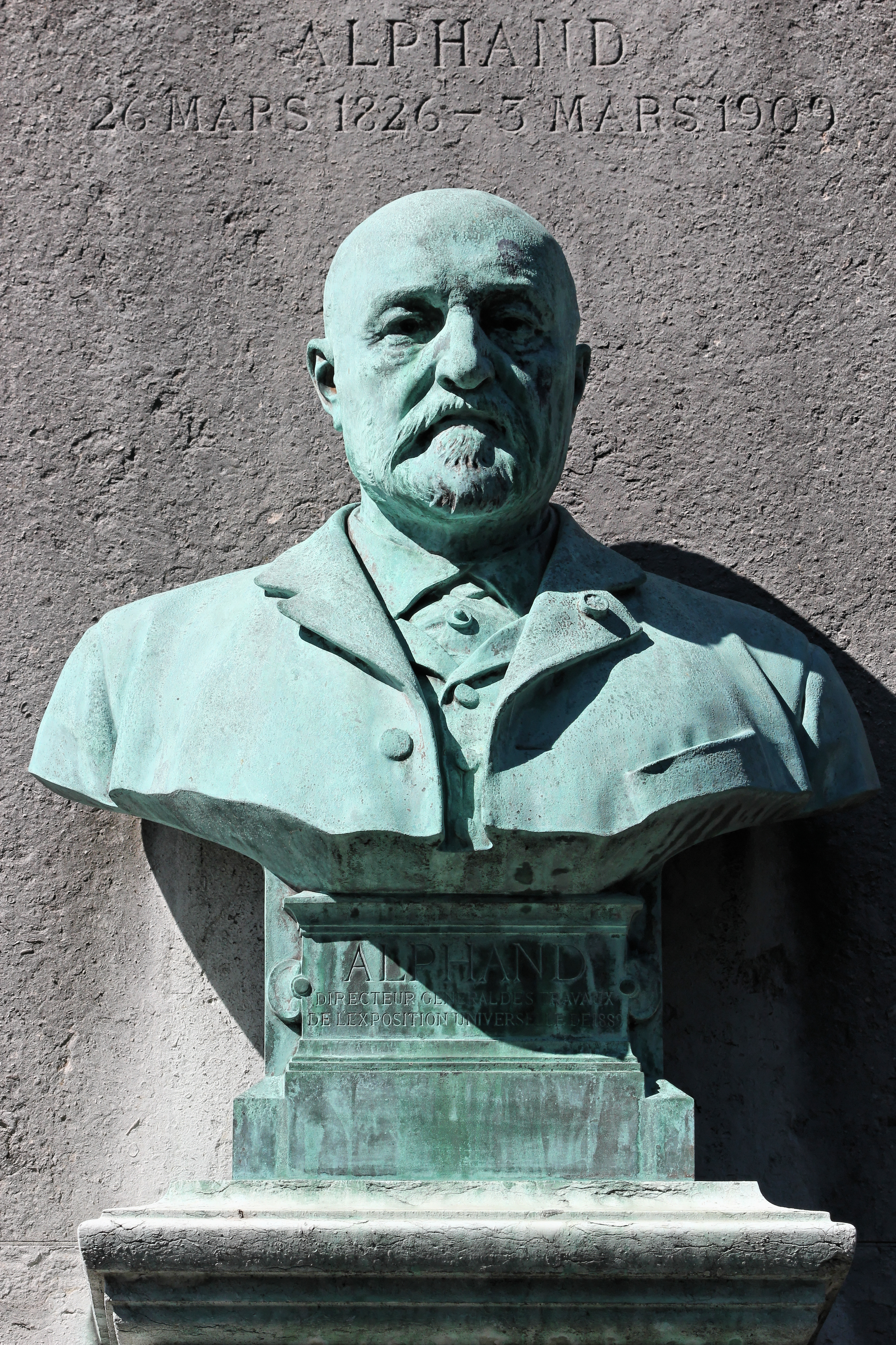 Tombe ornée d'un buste en bronze signé Jules Coutan, 1890.